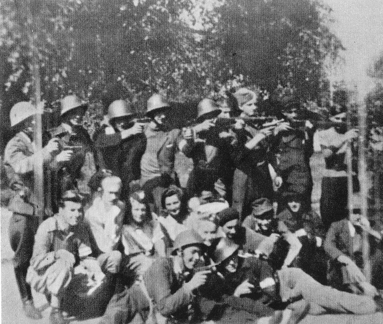 Oddział Armii Ludowej walczący w czasie powstania na Żoliborzu